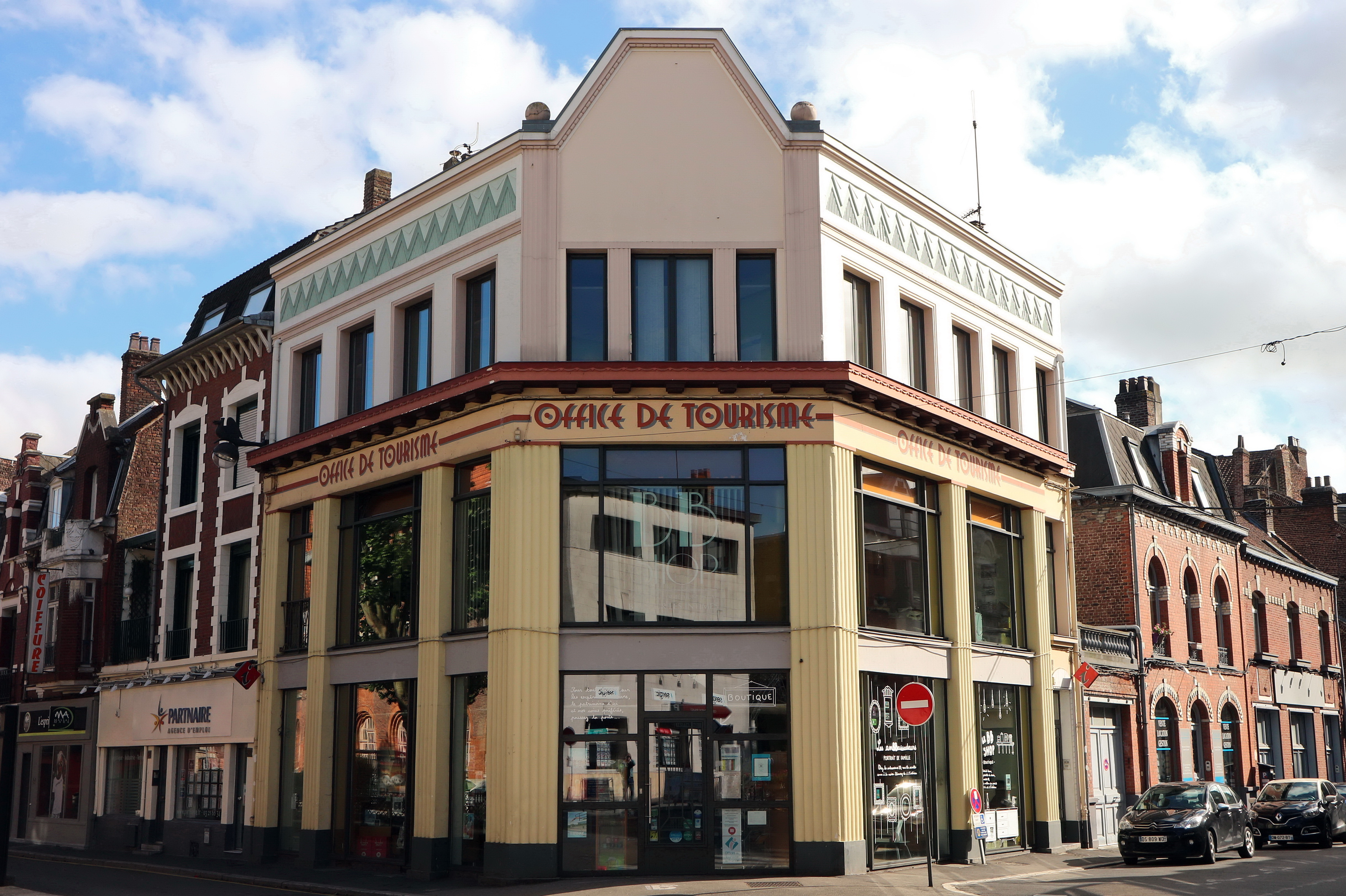 Béthune ( France - Pas-de-Calais) – Office de tourisme - Art décoBâtiment à l'angle du Bd. Jean Jaurès et de la rue Aristide Briand Architecte .........